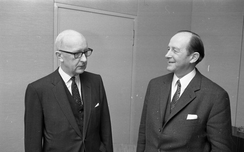 Min. Präs. Filbinger und der Botschafter der Schweiz Dr. Hans Lacher in der Landesvertretung Baden-Württemberg